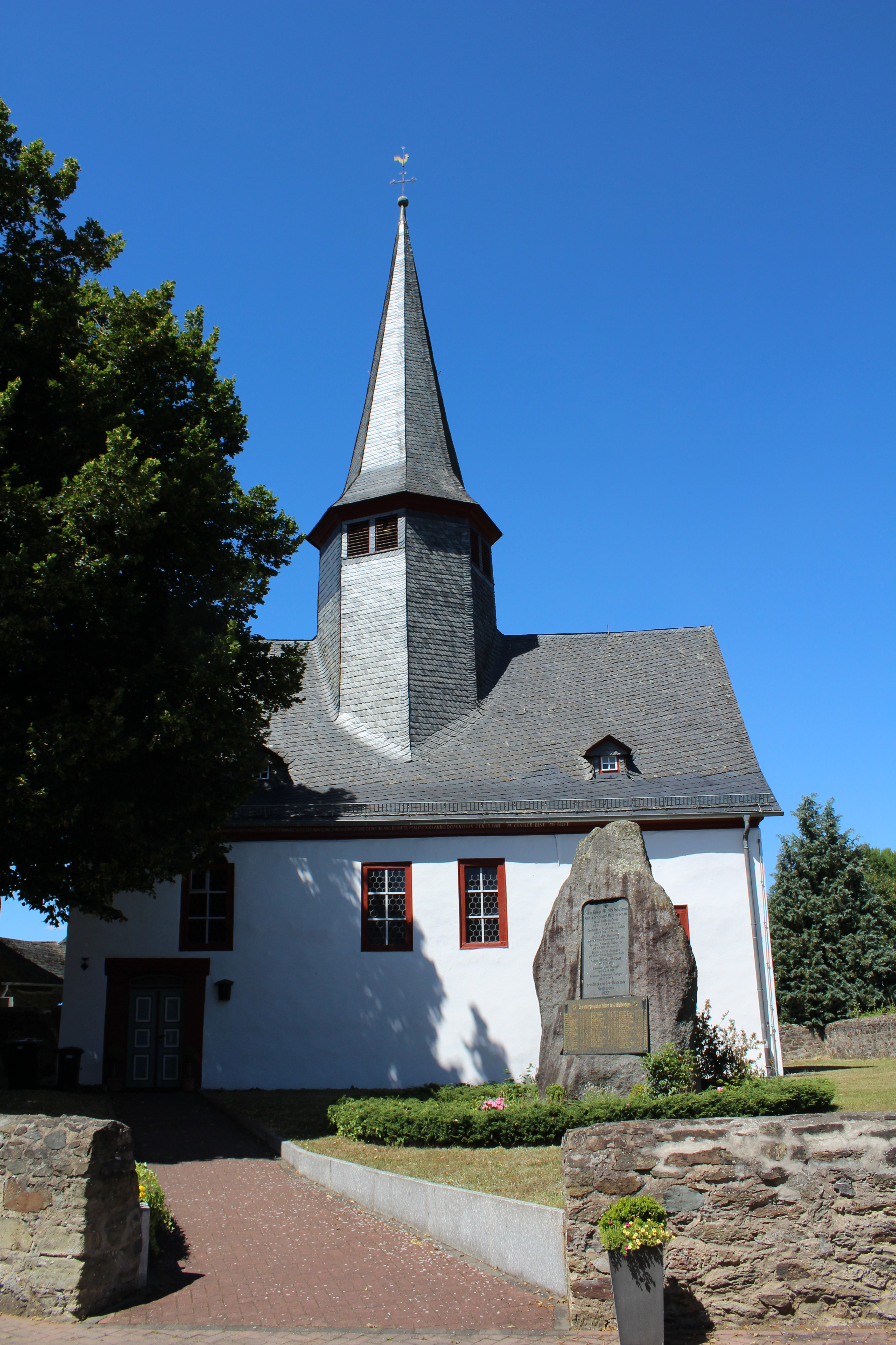 Evangelische Kirche Kraftsolms, Gemeinde Waldsolms, Hessen, Deutschland